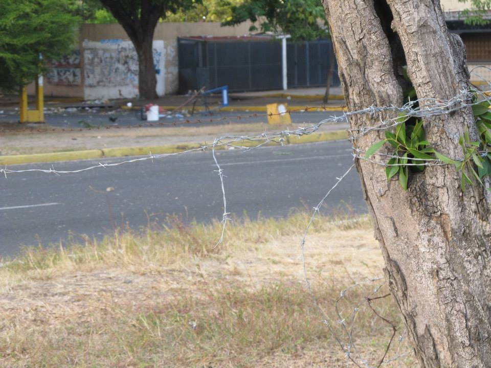 Alambre de púas en guarimba venezolana, en Ciudad Guayana - Febrero 2014